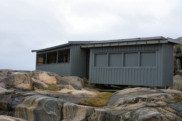 The birding shelters at Kråkudden, Hönö, Sweden